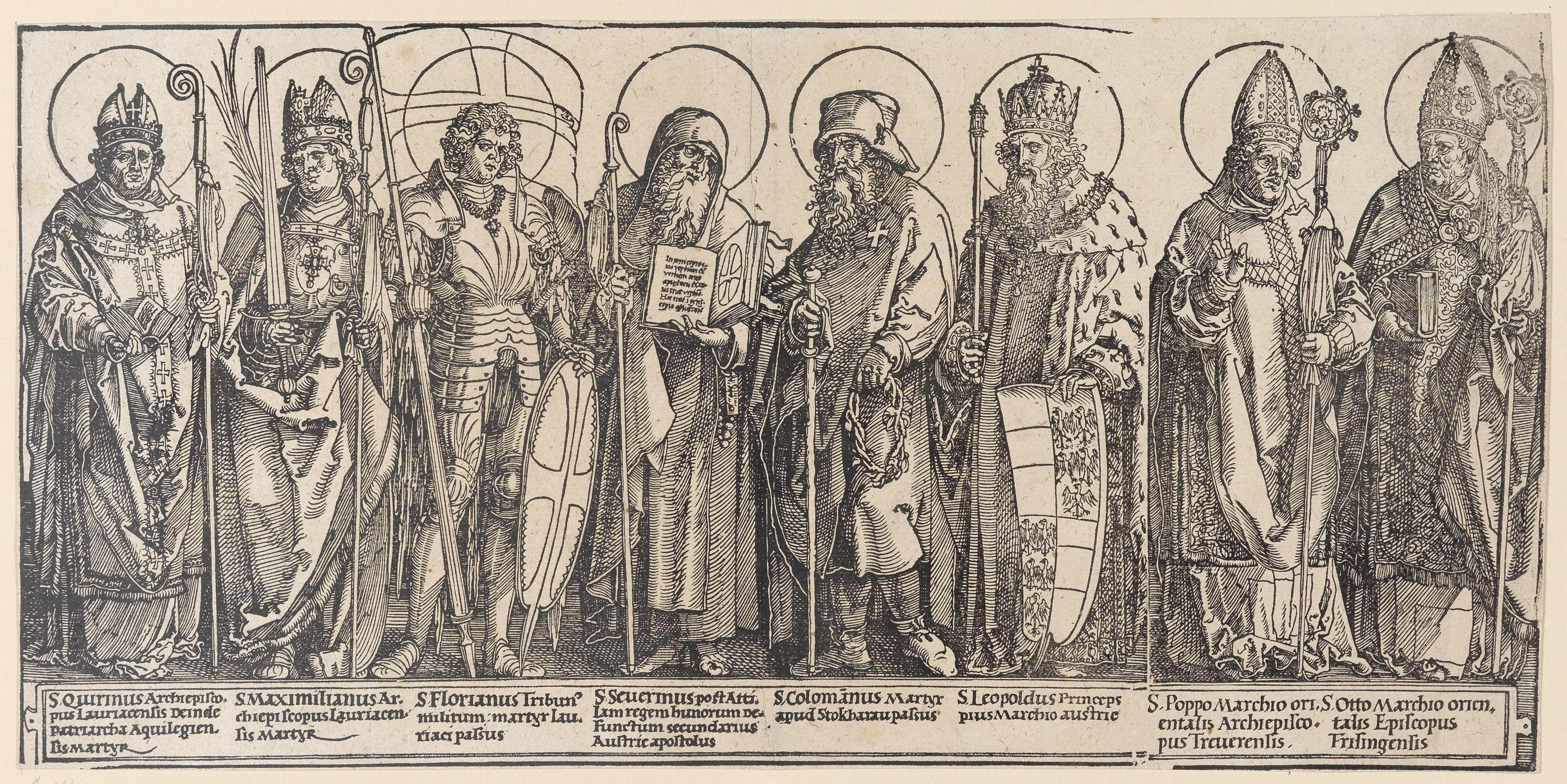 Die Schutzheiligen von Österreich, Holzschnitt, ohne Monogramm, 17,7 x 36 cm, Wasserzeichen kleines gotisches p und Wäppchen (um 1625), späterer Abdruck des II. Zustandes (Meder 219 g), Drucklegung um 1625.